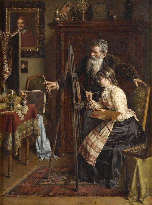 Die Kunststudentin. Öl auf Holz, 50 x 38,5 cm